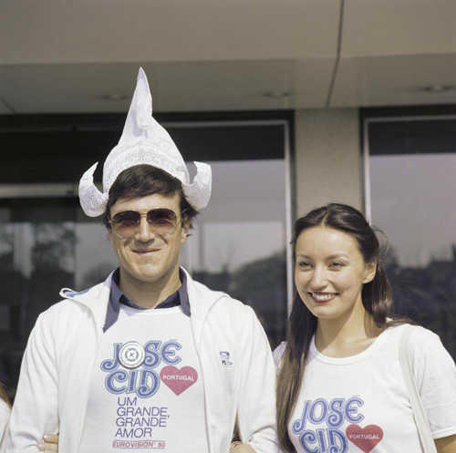 De Portugese zanger José Cid tijdens een fotosessie voor het Eurovisie Songfestival 1980